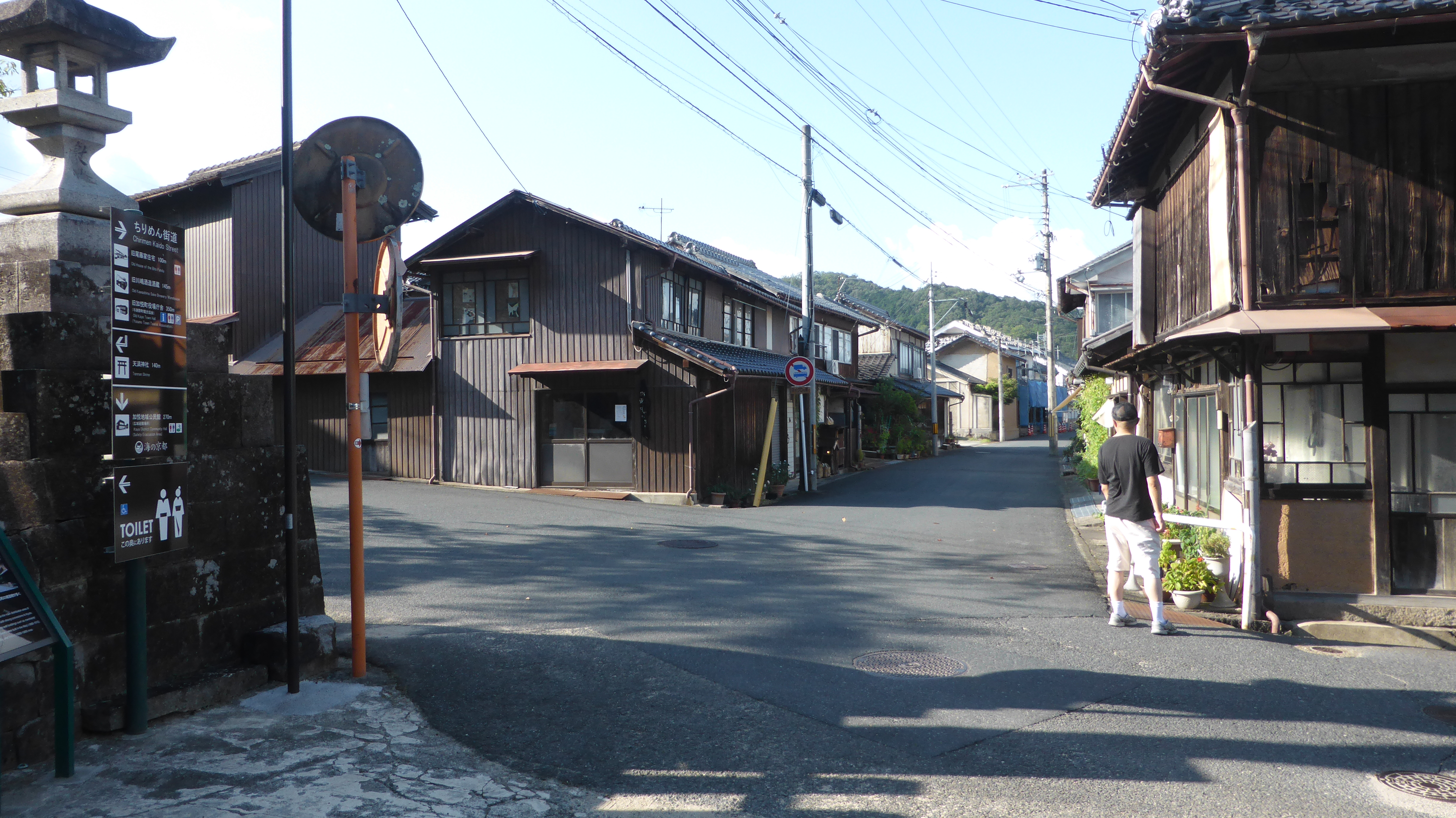 2019.09.15撮影 撮影者の背面には加悦地区公民館